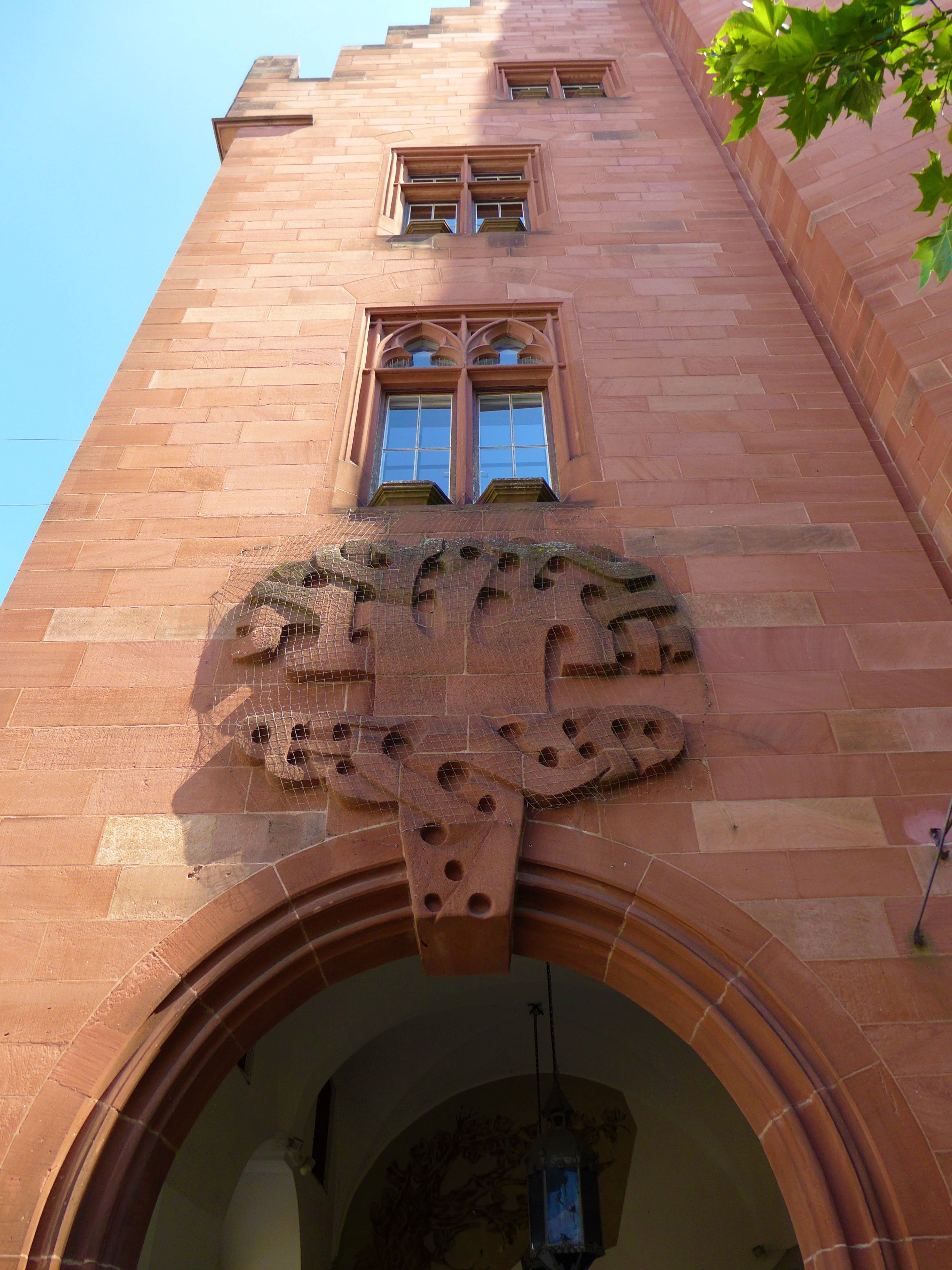 Rathaus St. Johann, Lebensbaum von Paul Schneider